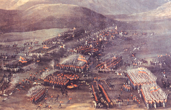 Bataille de Miñarica. 1835